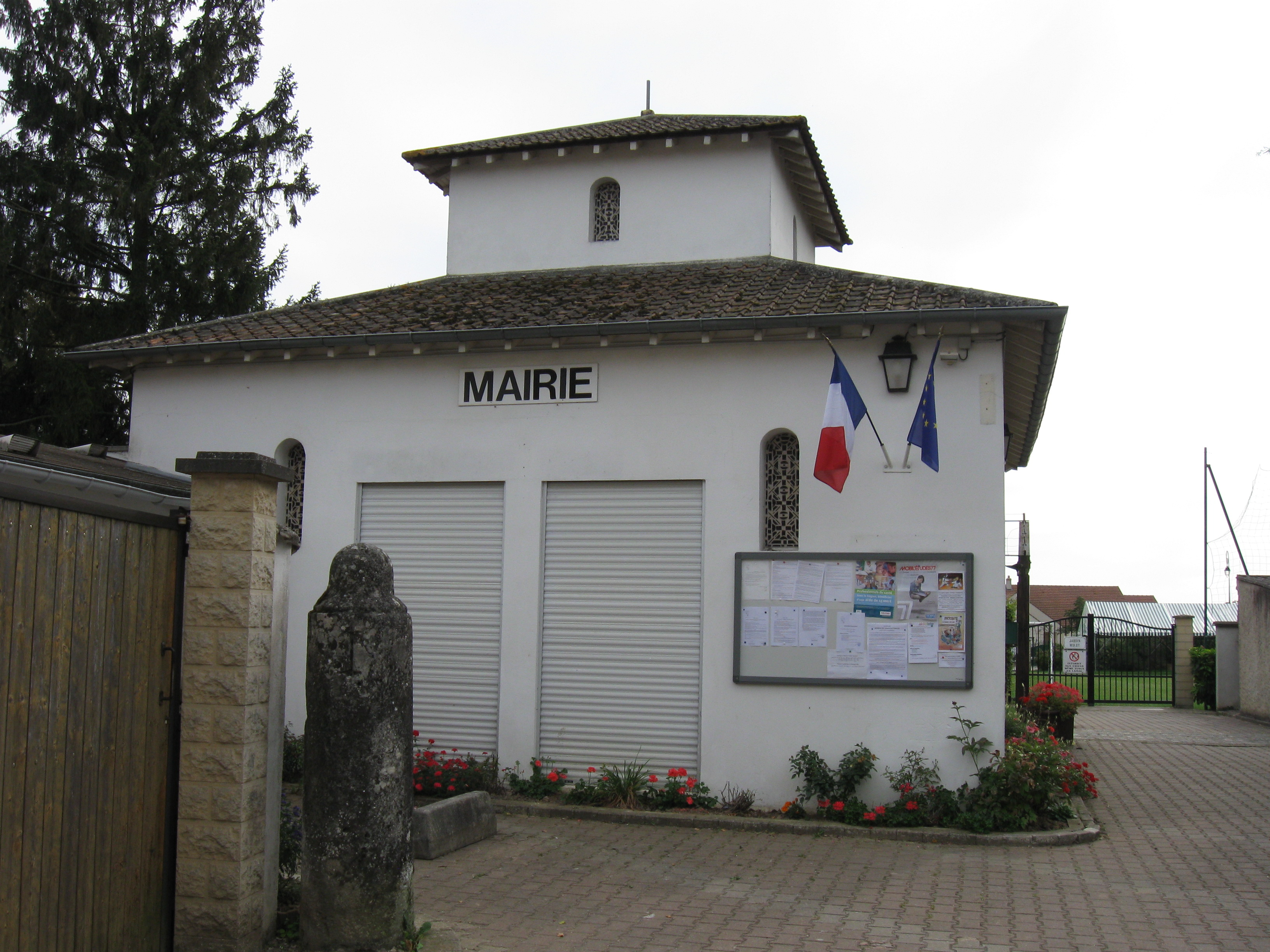 Mairie de Le Plessis-l'Évêque. (Seine-et-Marne, région Île-de-France).